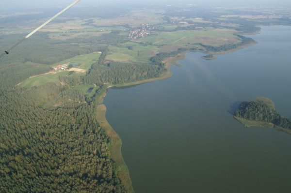 Jezioro Wadąg